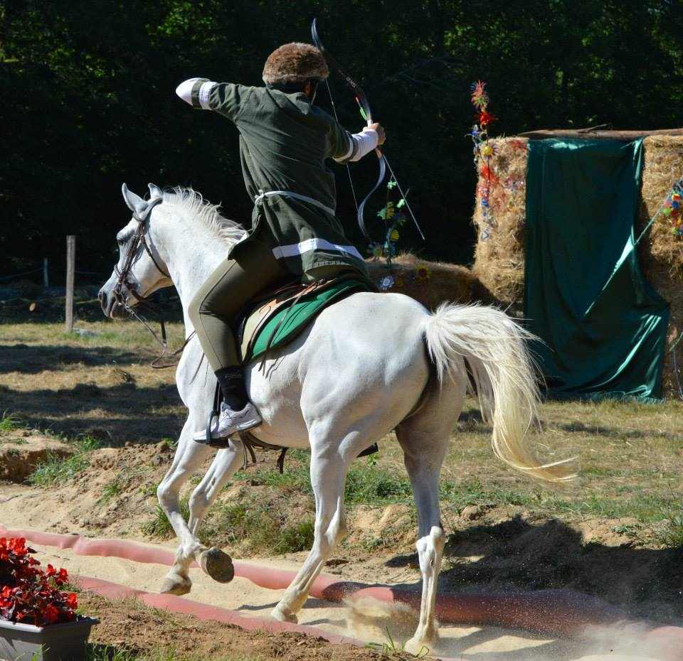 pur sang arabe tir à l'arc à cheval (Alstare Idaa & John Batta )